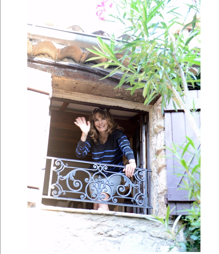 photo de clementine dans sa maison du sud de la France.